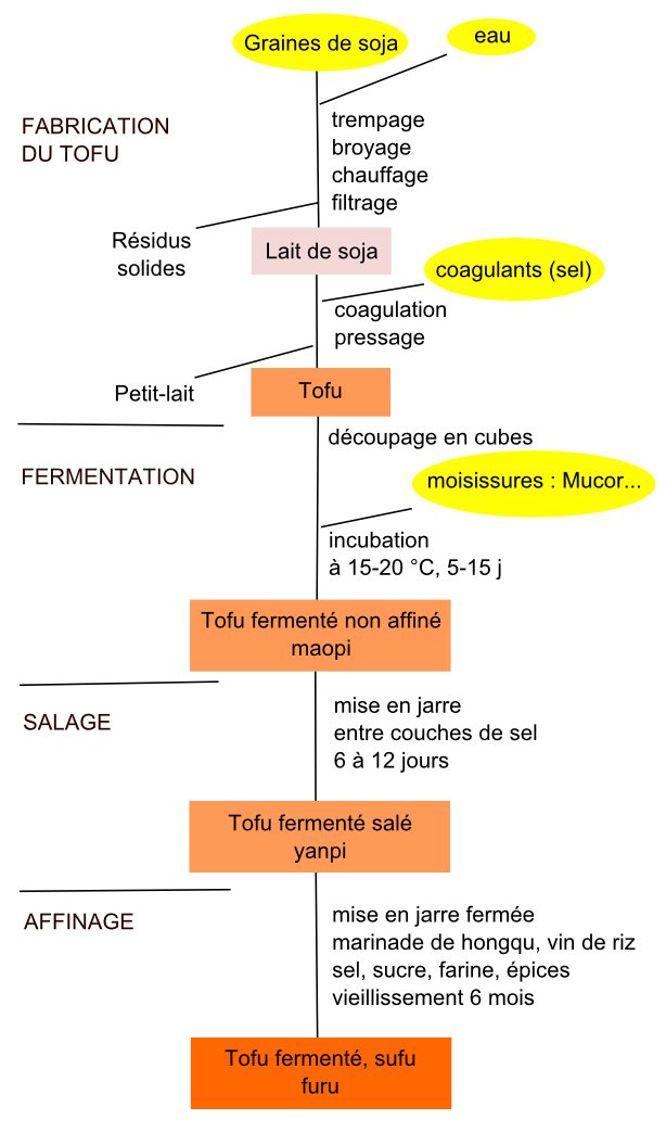 Procédure de fabrication traditionnelle du tofu fermenté, d'après Han et als, A Chinese fermented soybean food, 2001